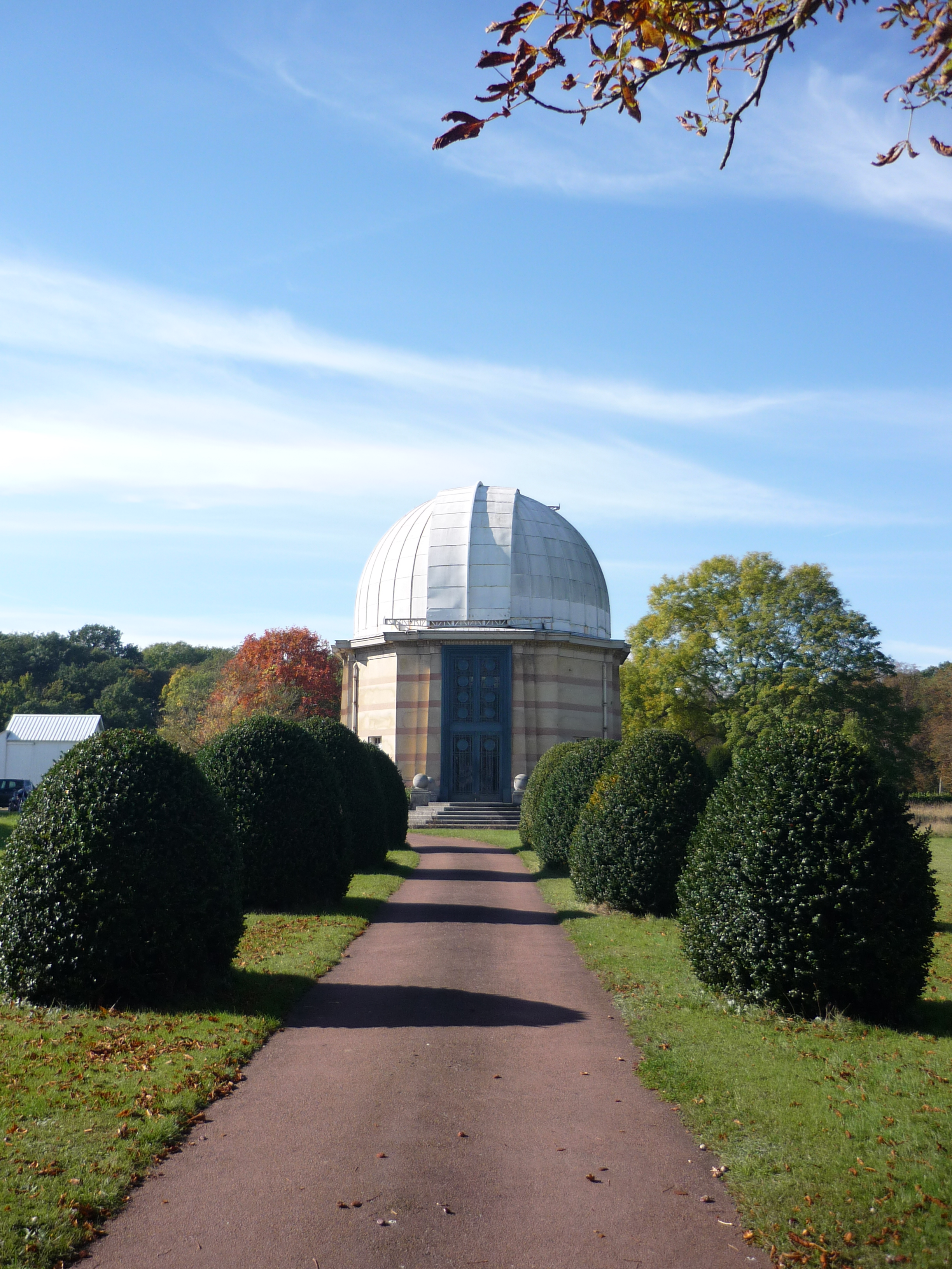 Coupole de la Table Equatoriale de Meudon